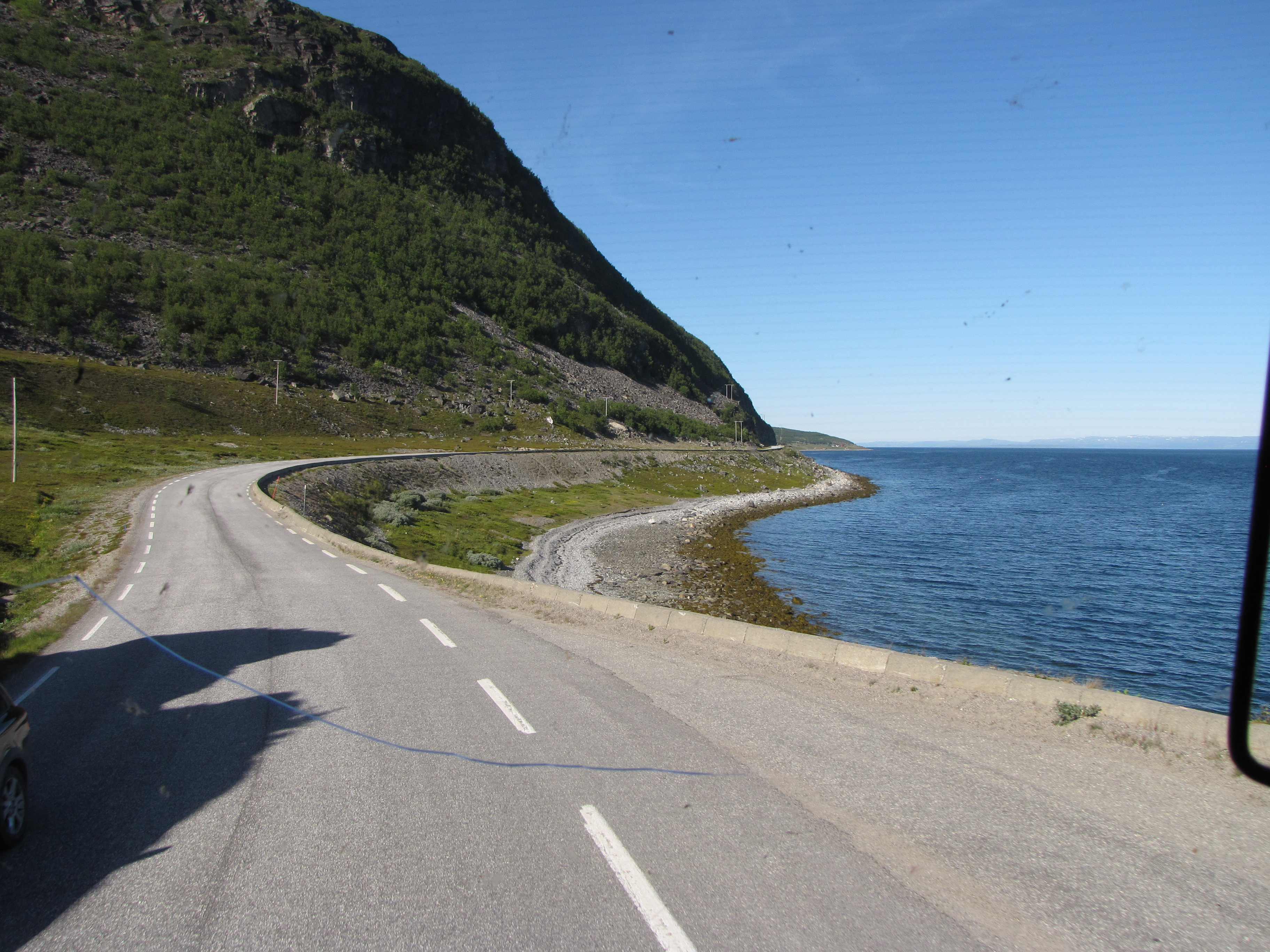 E69 vid Porsangersfjorden.